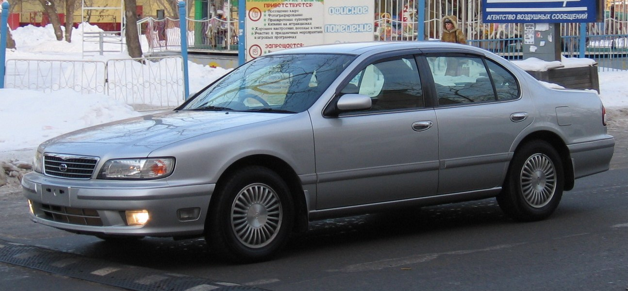 Photo taken in Tomsk, Russia